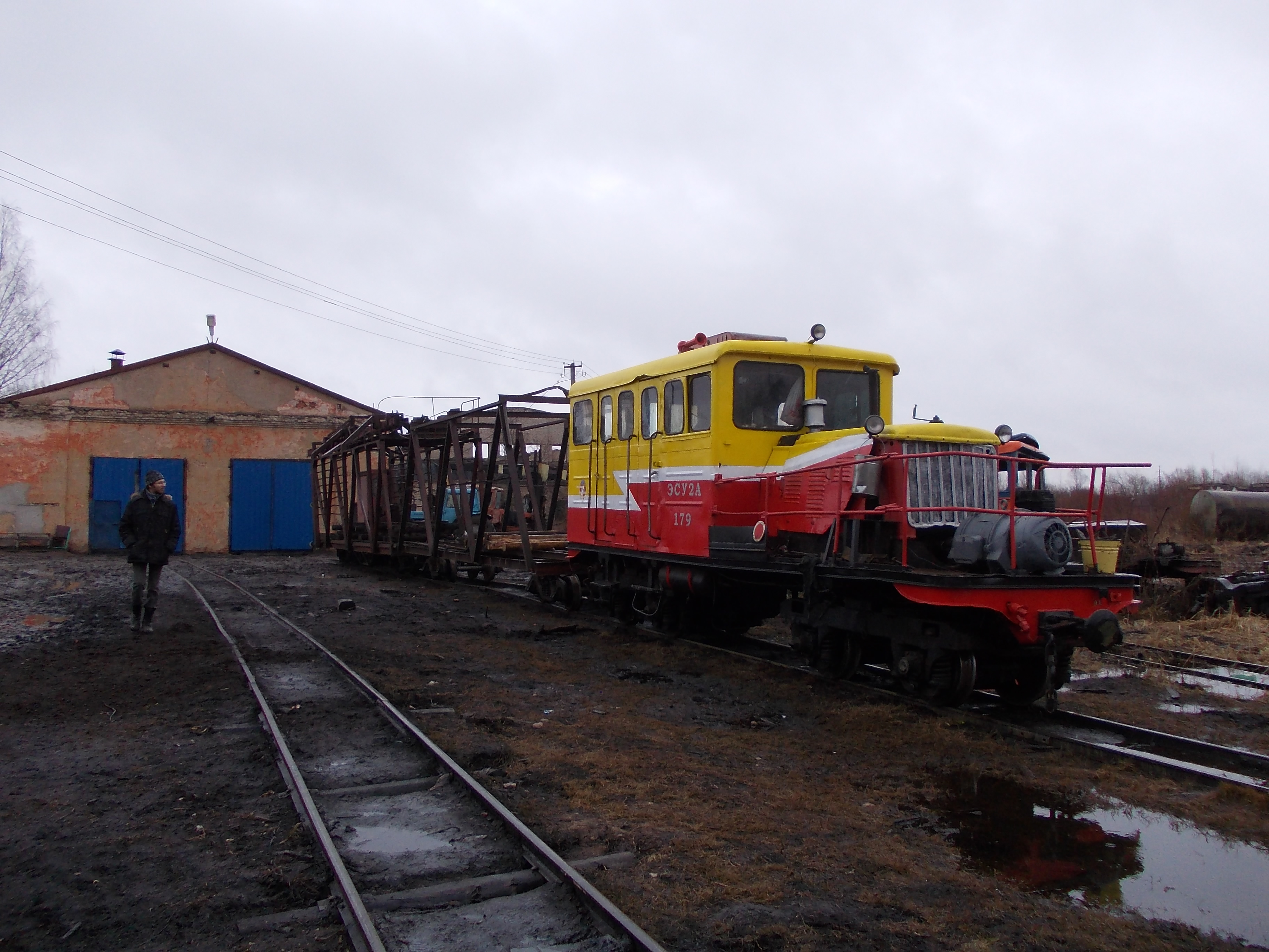 Депо Тёсовской УЖД, апрель 2015 года.